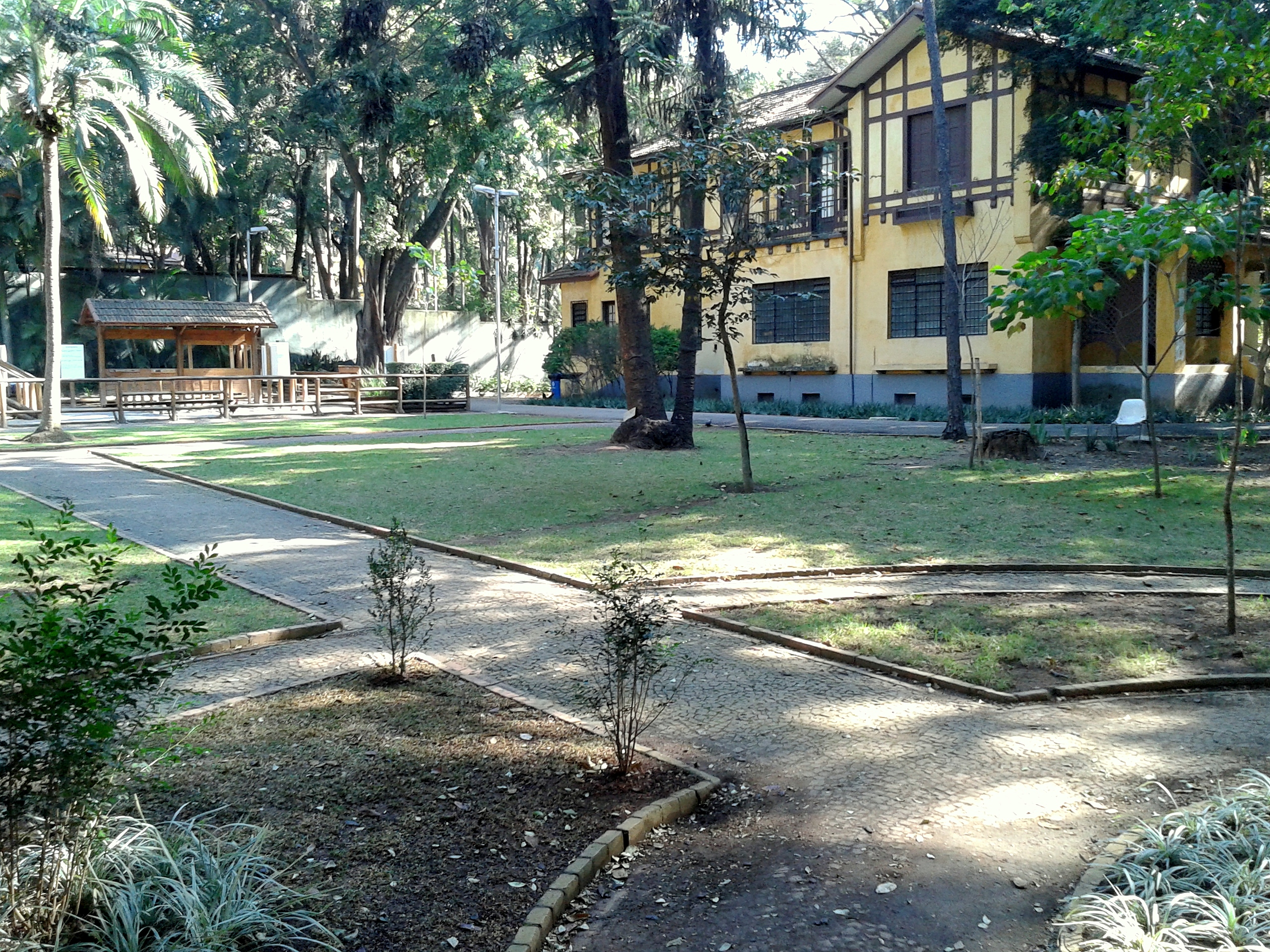 Espaço de Convivência do Fundo Social de Solidariedade do Estado de São Paulo (FUSSESP), localizado no interior do Parque da Água Branca. São Paulo, SP, Brasil.